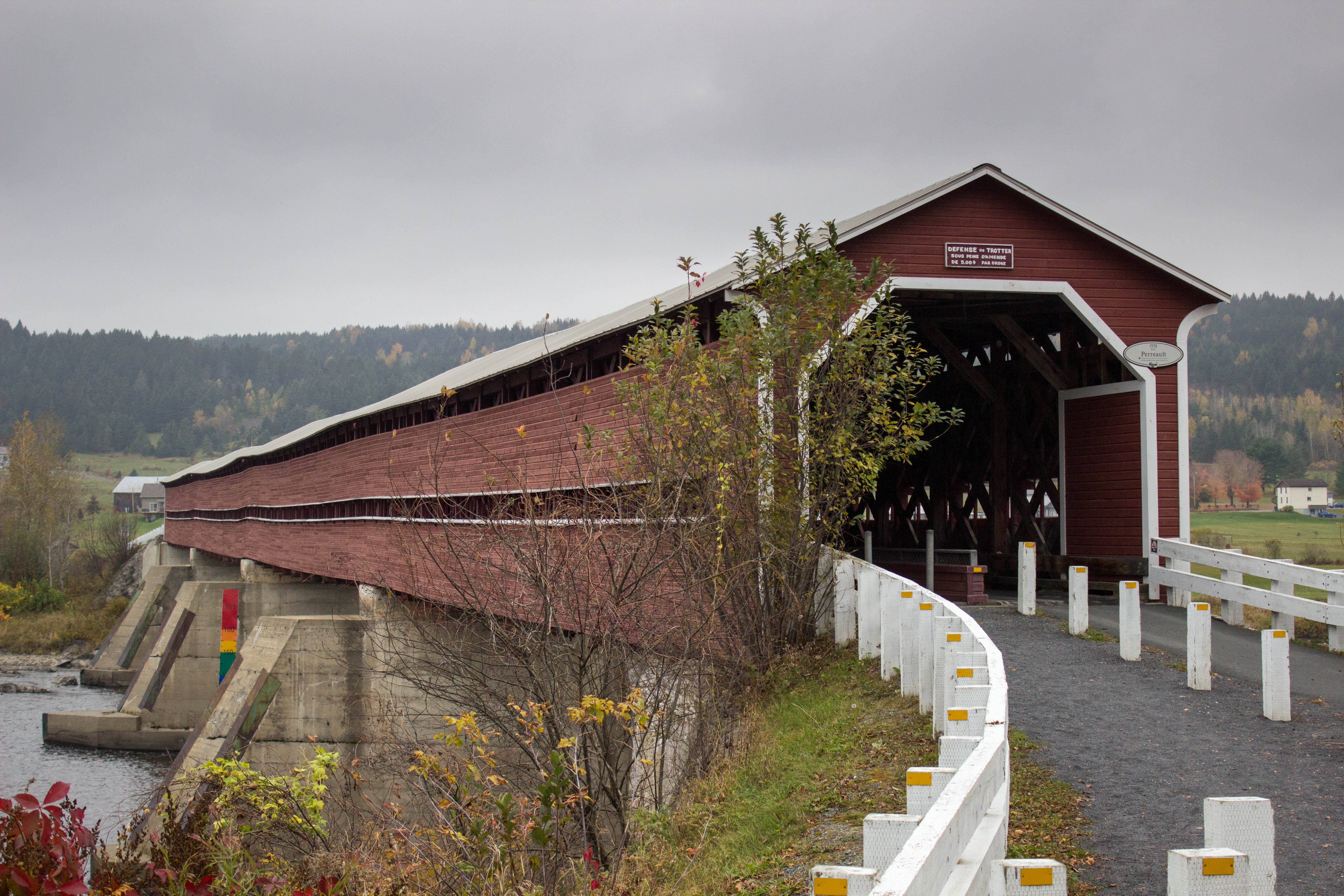 Pont Perrault à Notre-Dame-des-Pins (Québec). La plaque indique que le pont doit son nom à Jean-Édouard Perreault, ministre à l'époque. Il s'agit plutôt du ministre Joseph-Édouard Perrault tel que mentionné en 2013 (lien) au ministère de la Culture et des Communications. Cette photo a été prise en 2013, les plaques devraient être remplacées afin de corriger cette erreur.